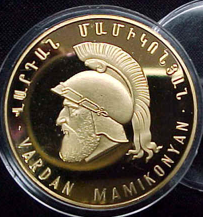 Современная медаль Армении с изображением Вардана Мамиконяна